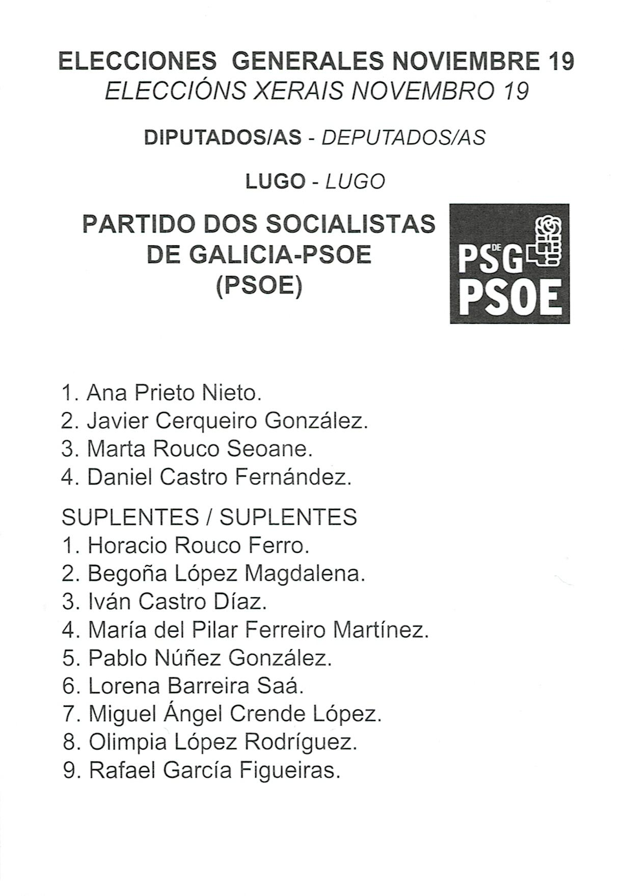 Eleccións Xerais Novembro 19 Papeleta Congreso por Lugo de Partido dos Socialistas de Galicia PSOE